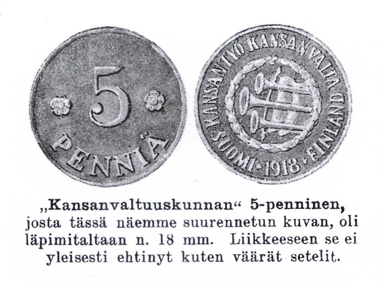 Kuva Suomen kansanvaltuuskunnan sisällissodan aikana lyöttämästä viiden pennin kolikosta; julkaistu Suomen Kuvalehdessä sodan päättymisen jälkeen.